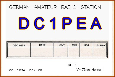 QSL-Karte